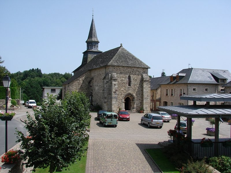 Saint Ybard